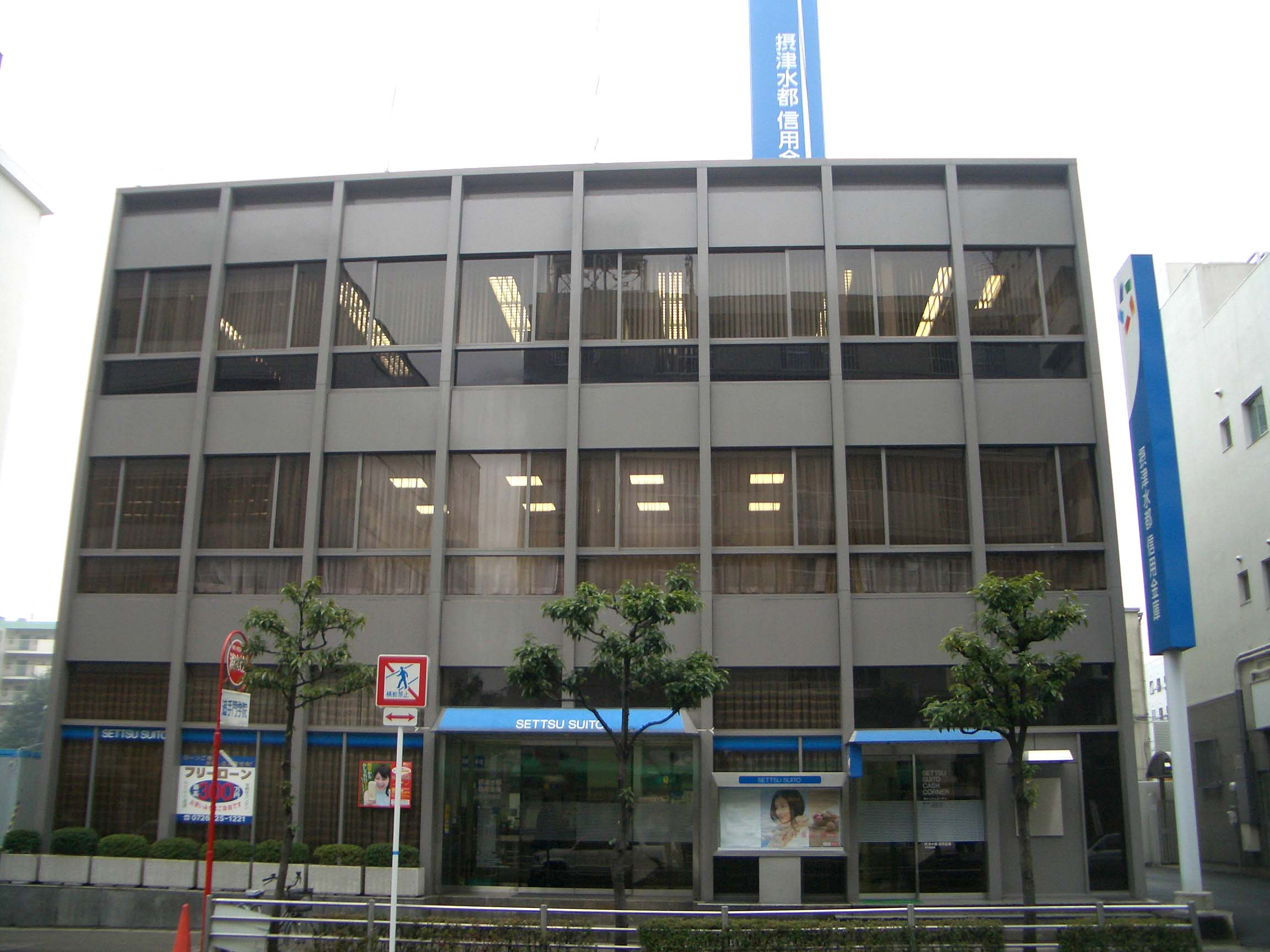 THE SETTSU SUITO SHINKIN BANK,Nishiekimaecho Ibaraki-City Osaka Japan.